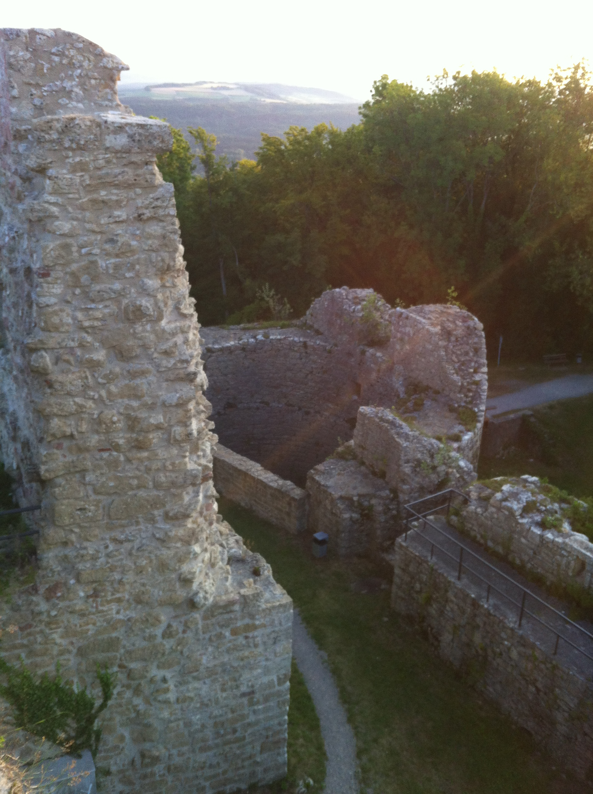 Ruine Küssaburg in Küssaberg im Landkreis Waldshut in Baden-Württemberg. Blick von der Plattform des Palas zum Geschützturm (1529).